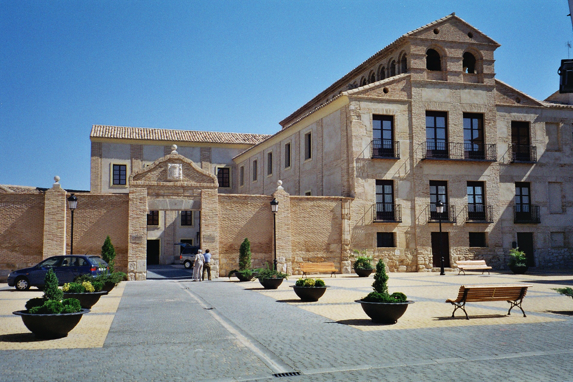 Fachada principal del Palacio de los Condes de Bureta